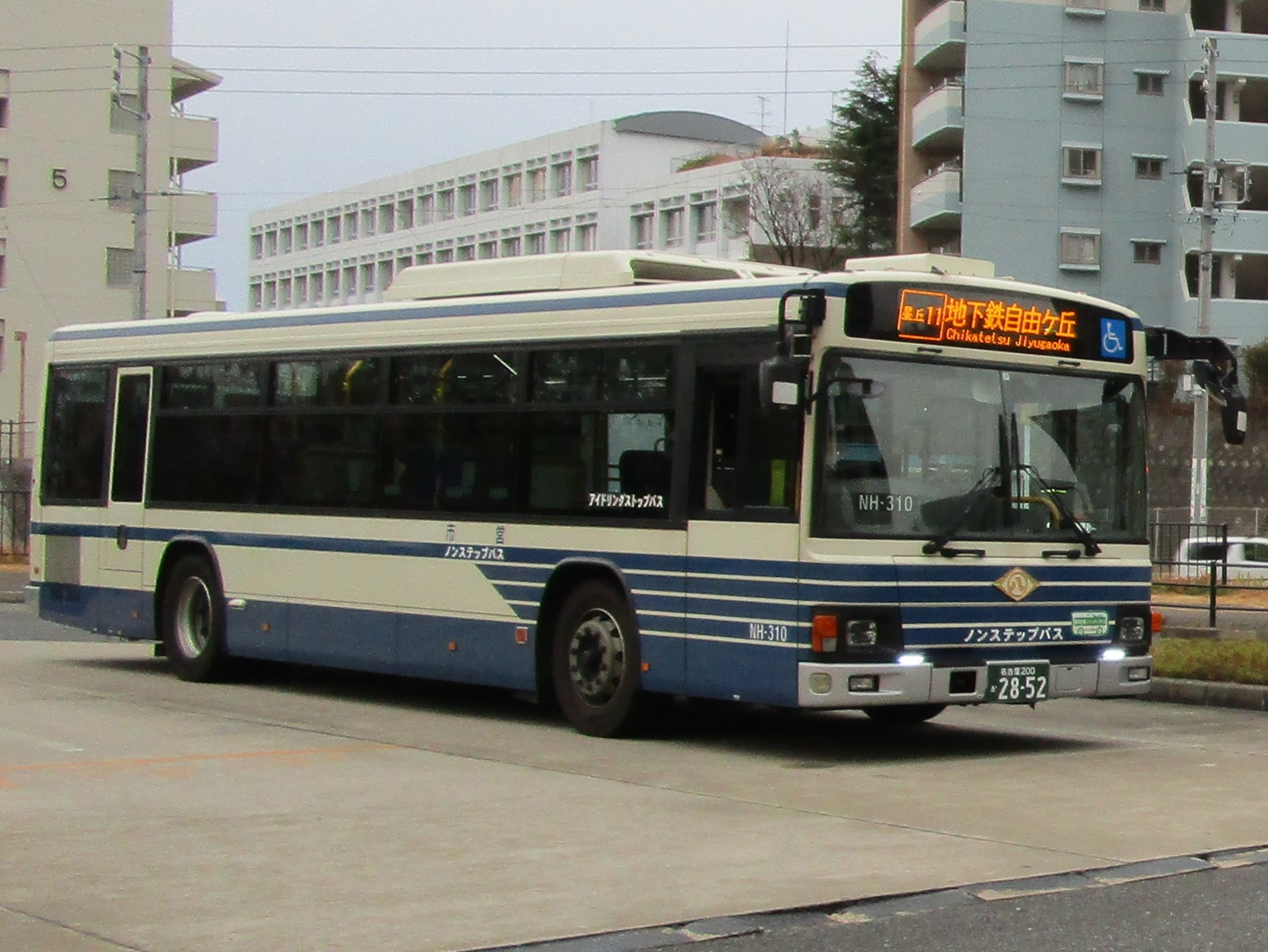 名古屋市営バス